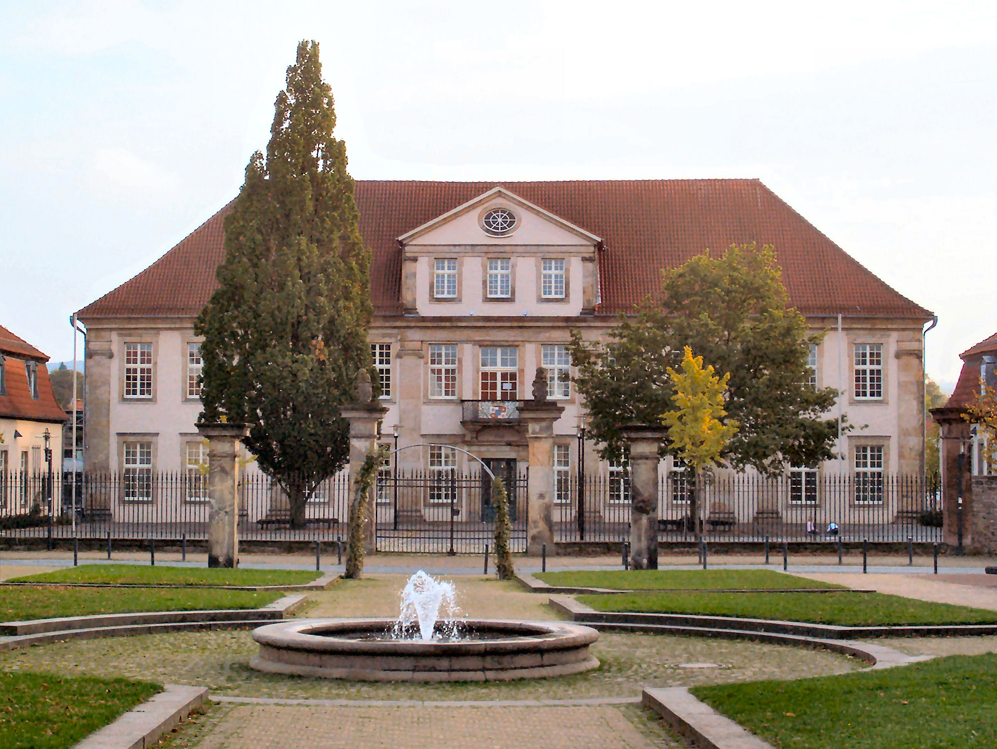 Hauptgebäude des Engelbert-Kaempfer-Gymnasiums in Lemgo